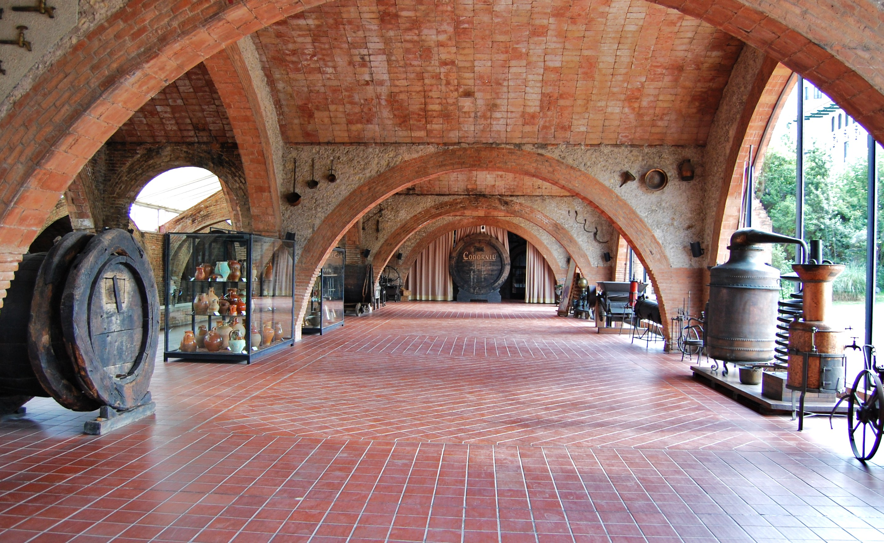 Caves Codorniu (Sant Sadurní d'Anoia)